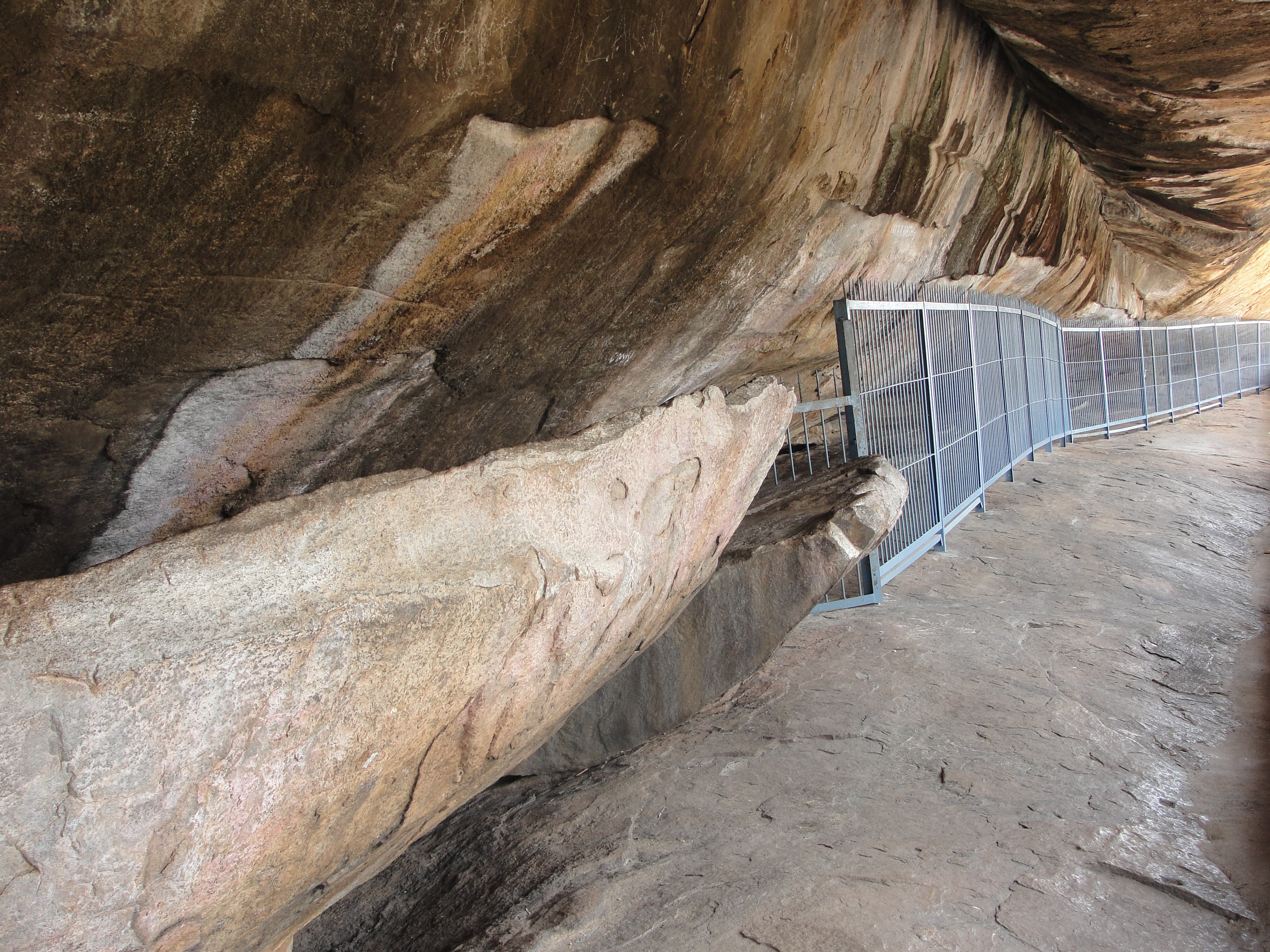 சித்தன்னவாசல் சமணப்படுக்கைகள்Unknown chithannavasal cave. period: 3-2 b.c., tamil nadu, india